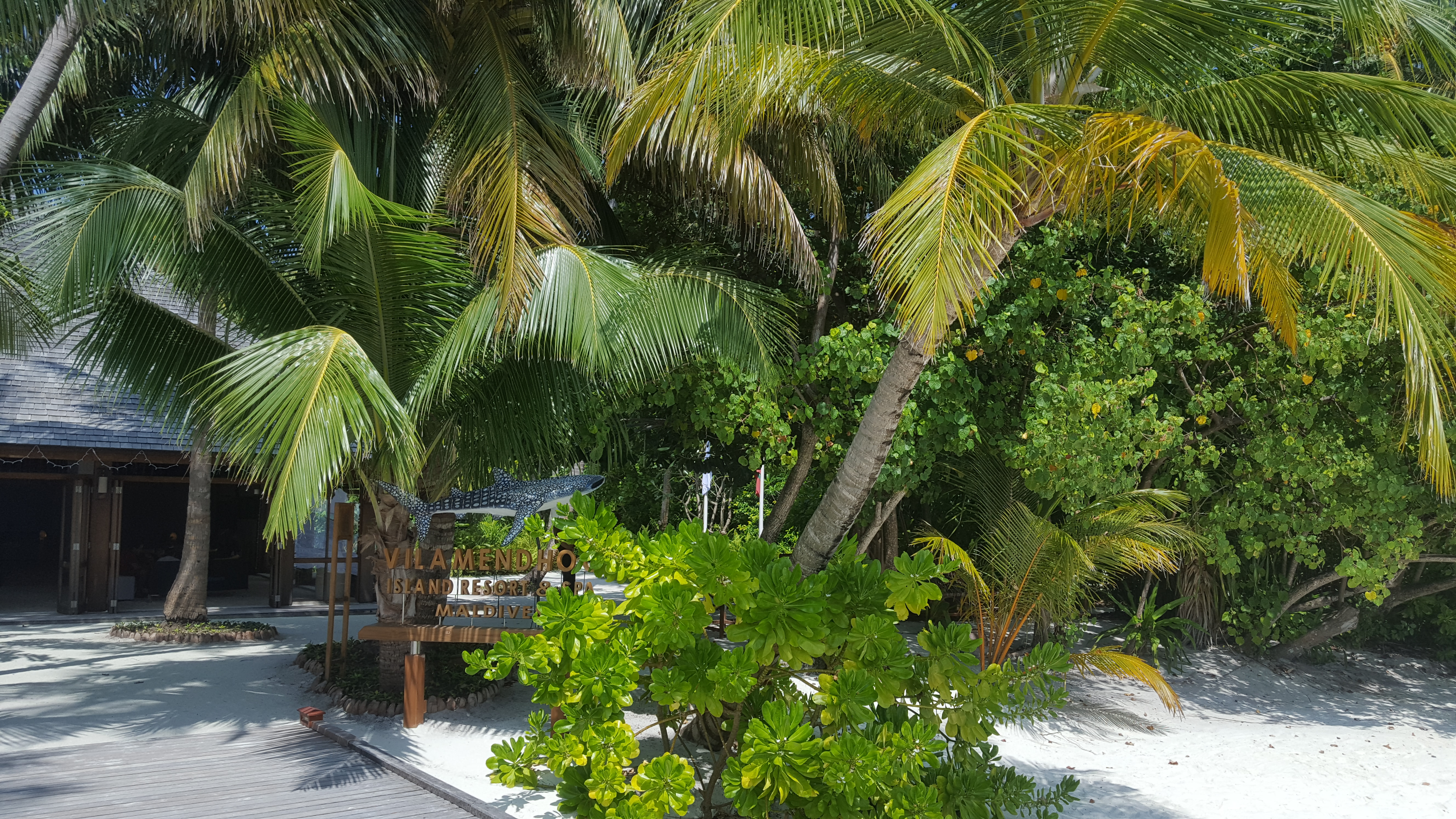 Vilamendhoo Empfangsbereich